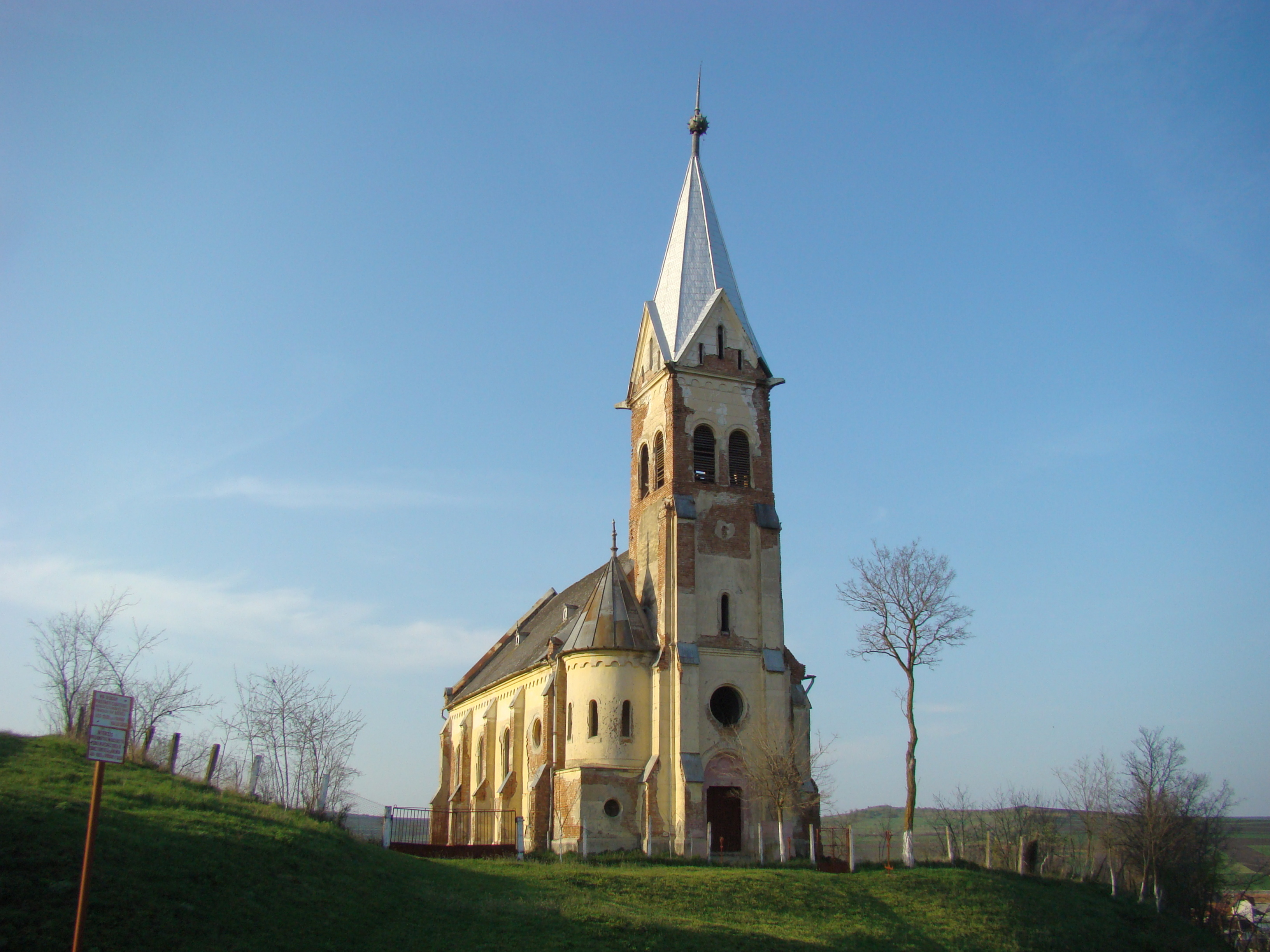 Biserica reformată din Tritenii de Sus, județul Cluj